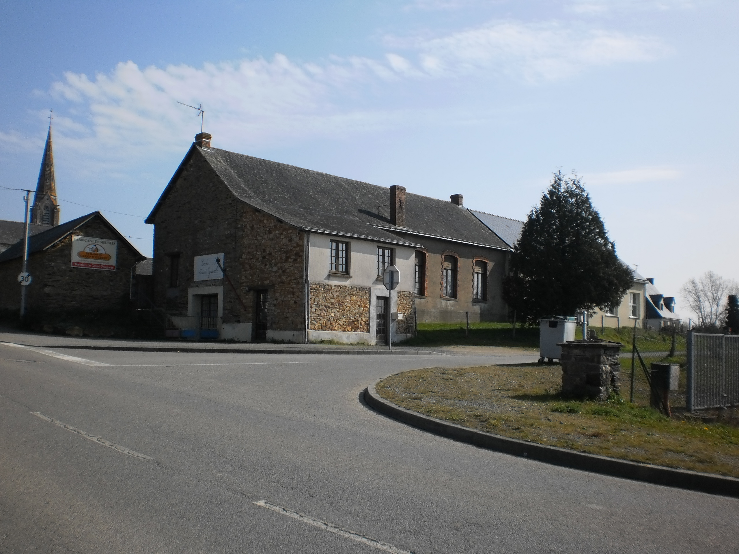 Pierric (Loire-Atlantique, France) - école